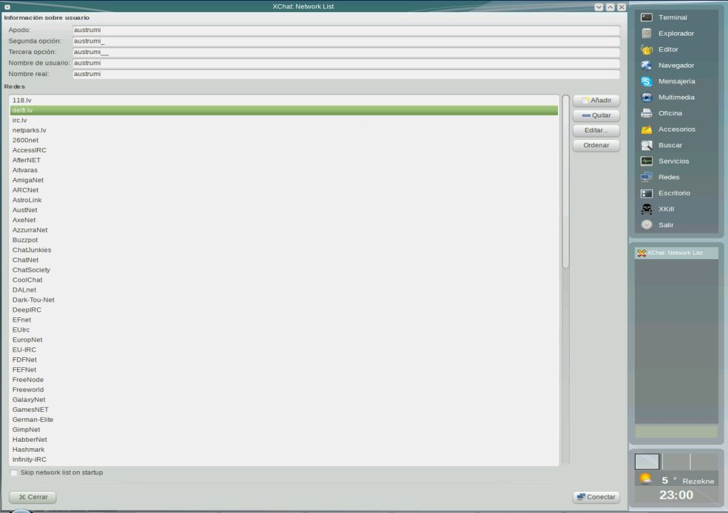 Programa IRC xchat.